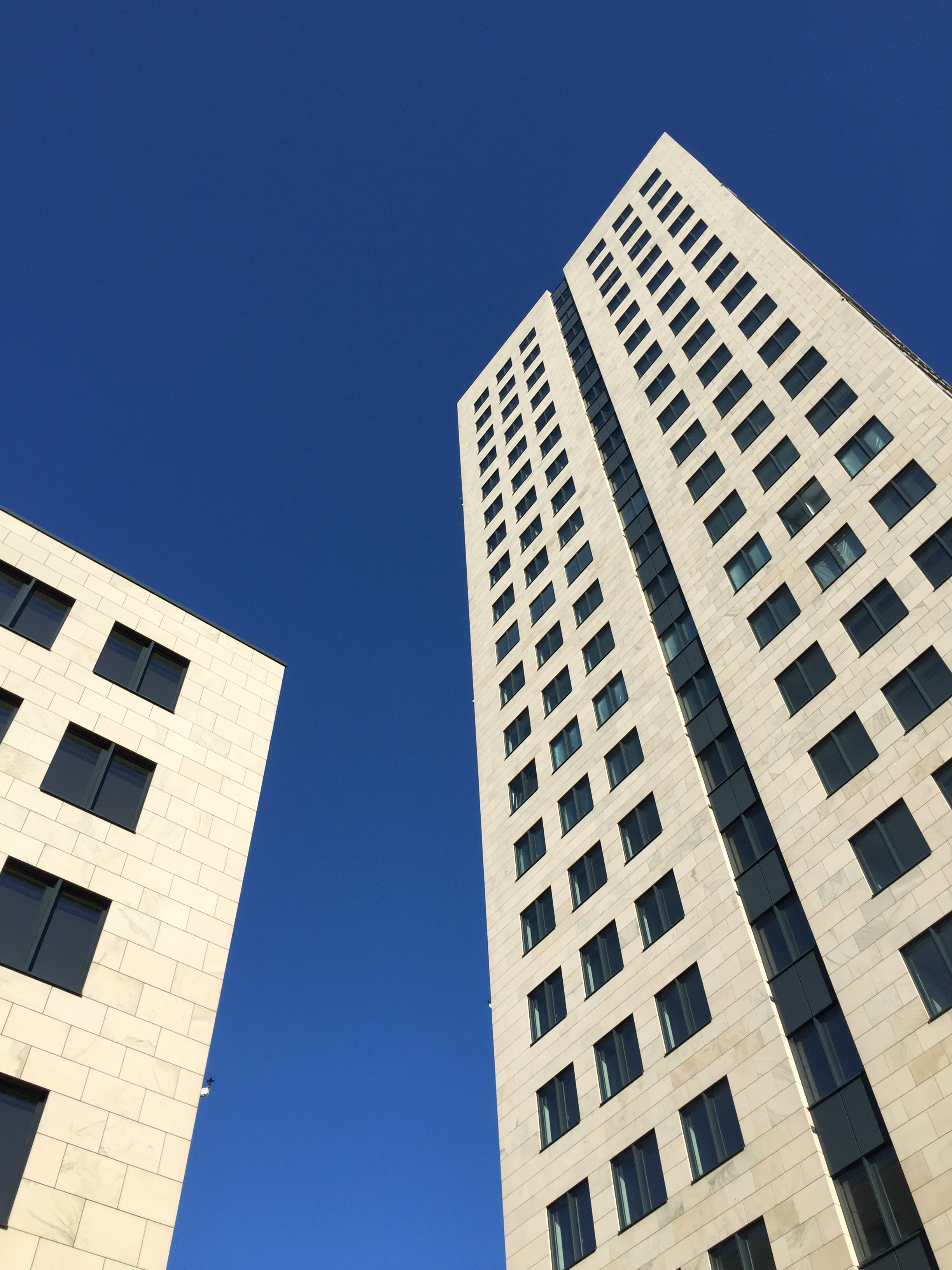 Westfalentower Dortmund Westfalendamm